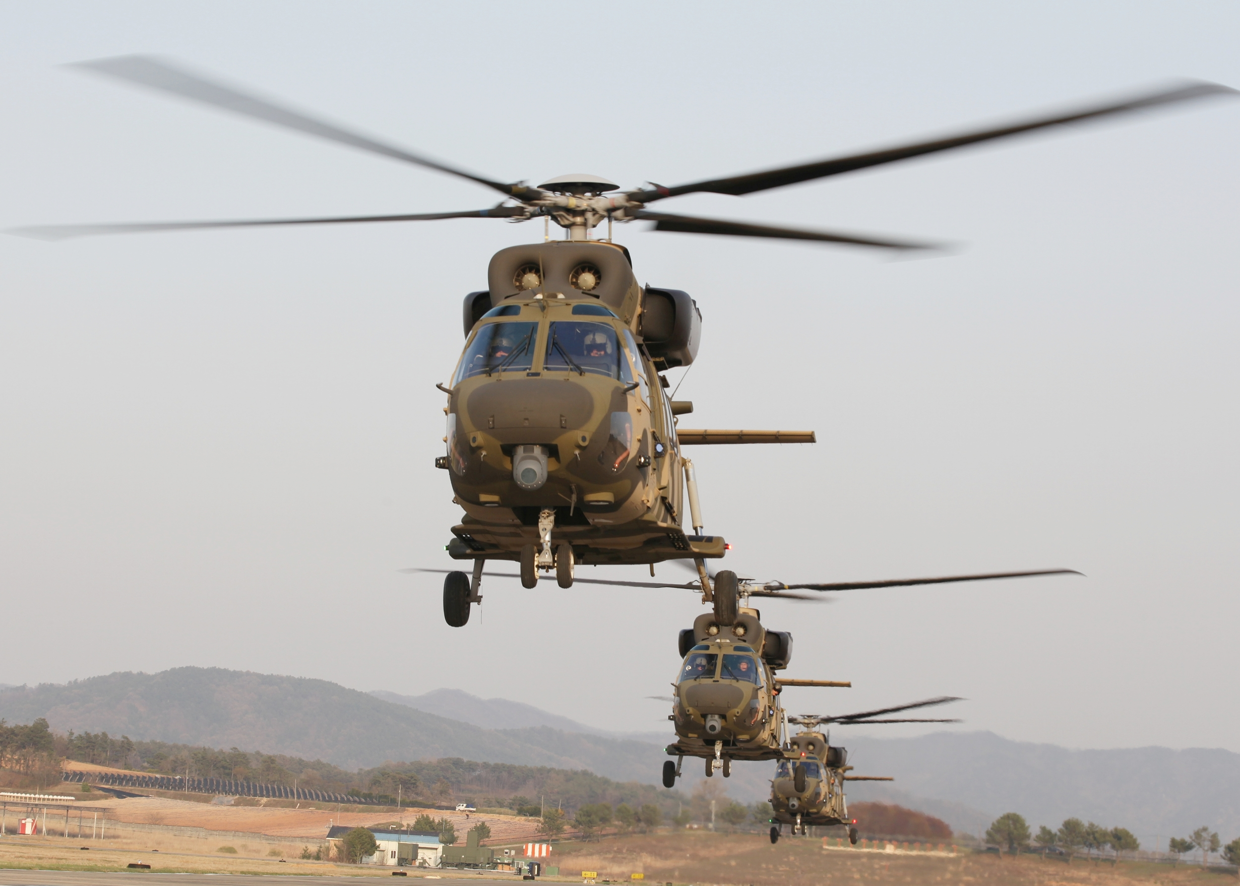 수리온 시험 비행